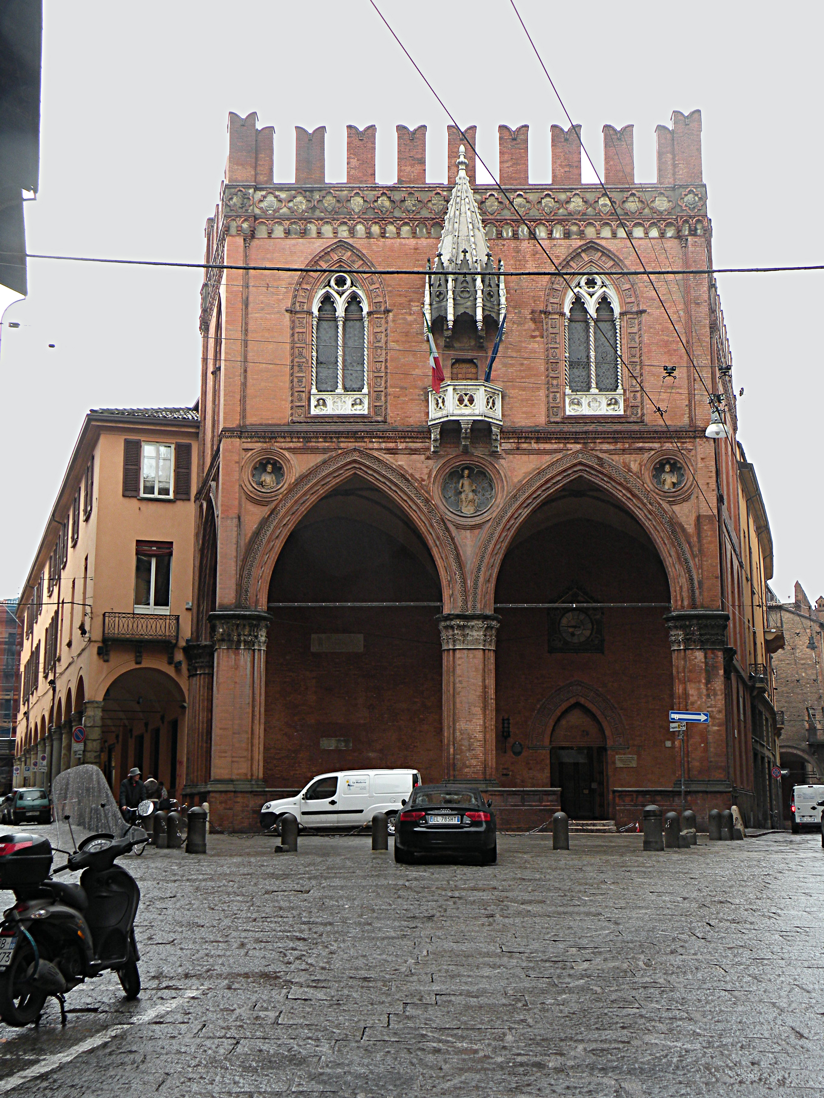 "Дворец торговли" в Болонье